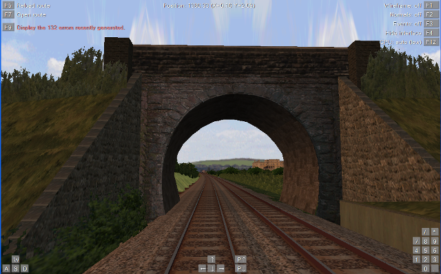 Ruta Dique Lujan para OpenBVE.